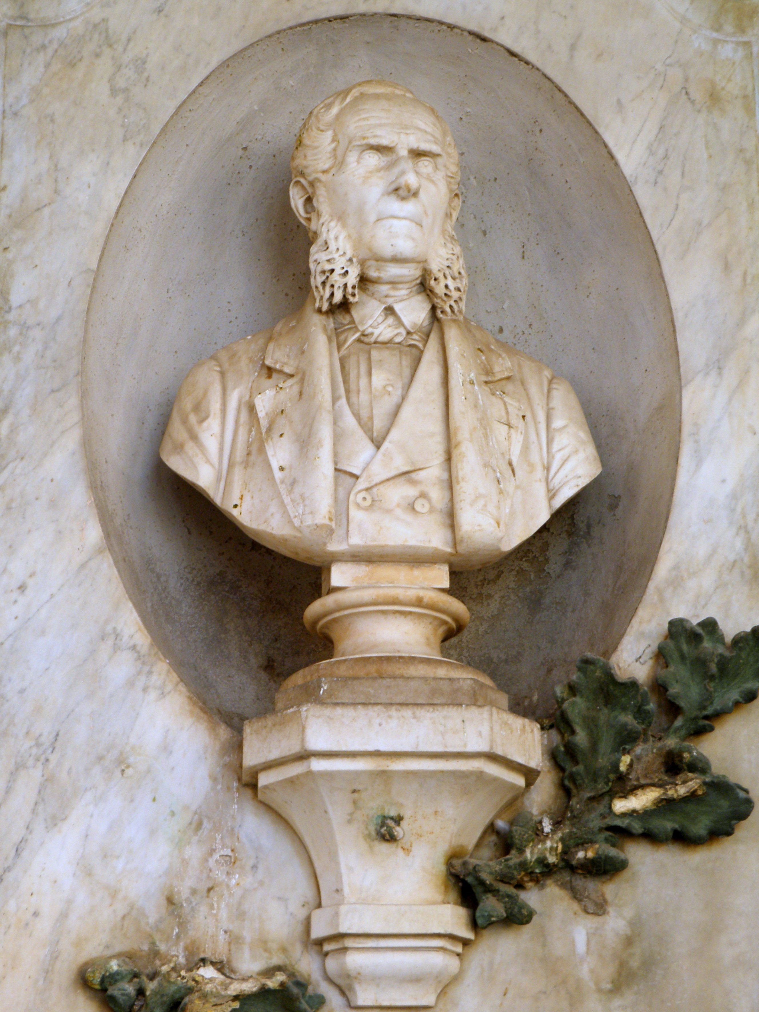 Rovigo, palazzina del Corpo di Guardia: dettaglio del busto inserito nella lapide commemorativa dedicata al Conte Domenico Angeli.